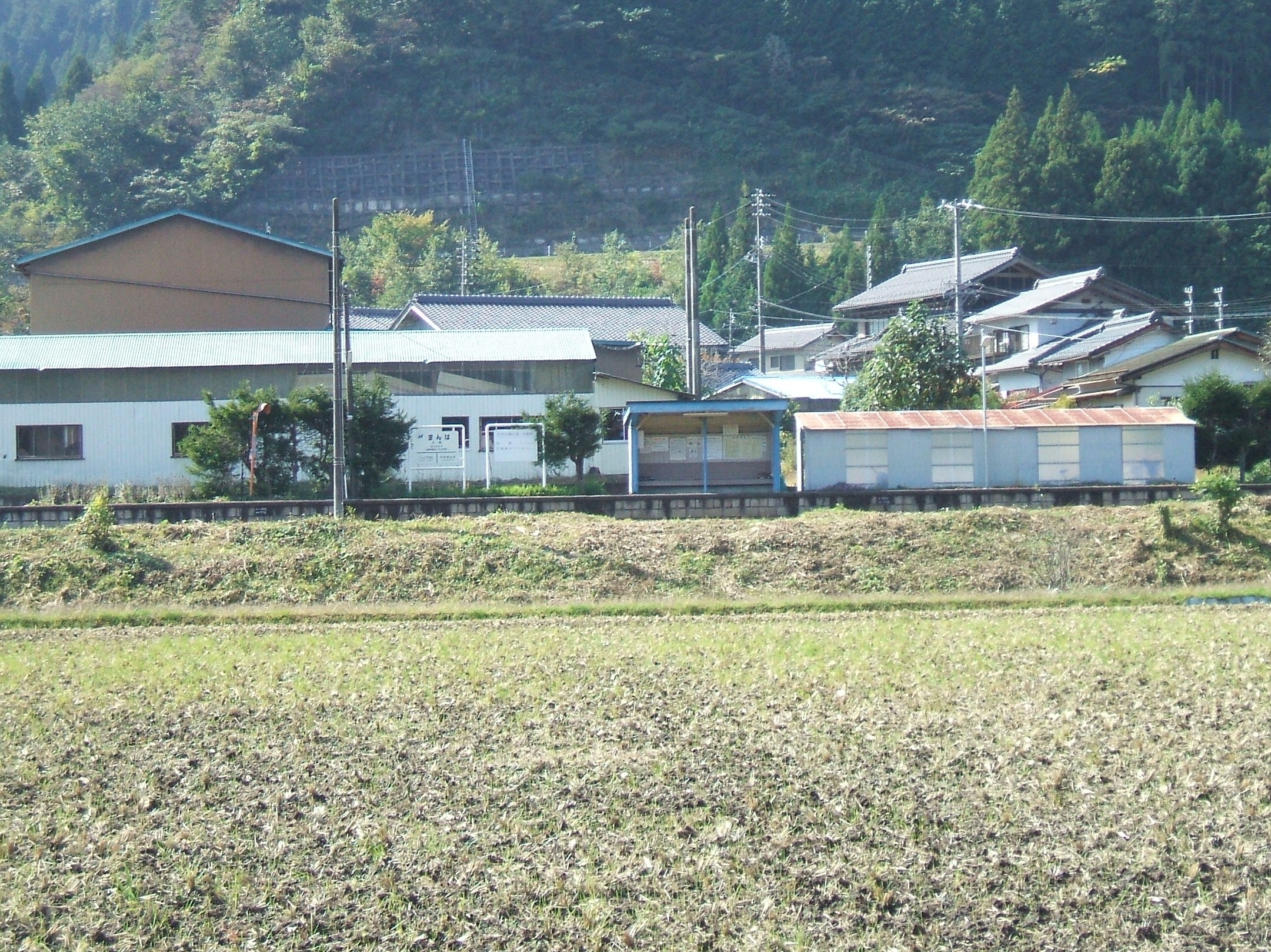 万場駅。